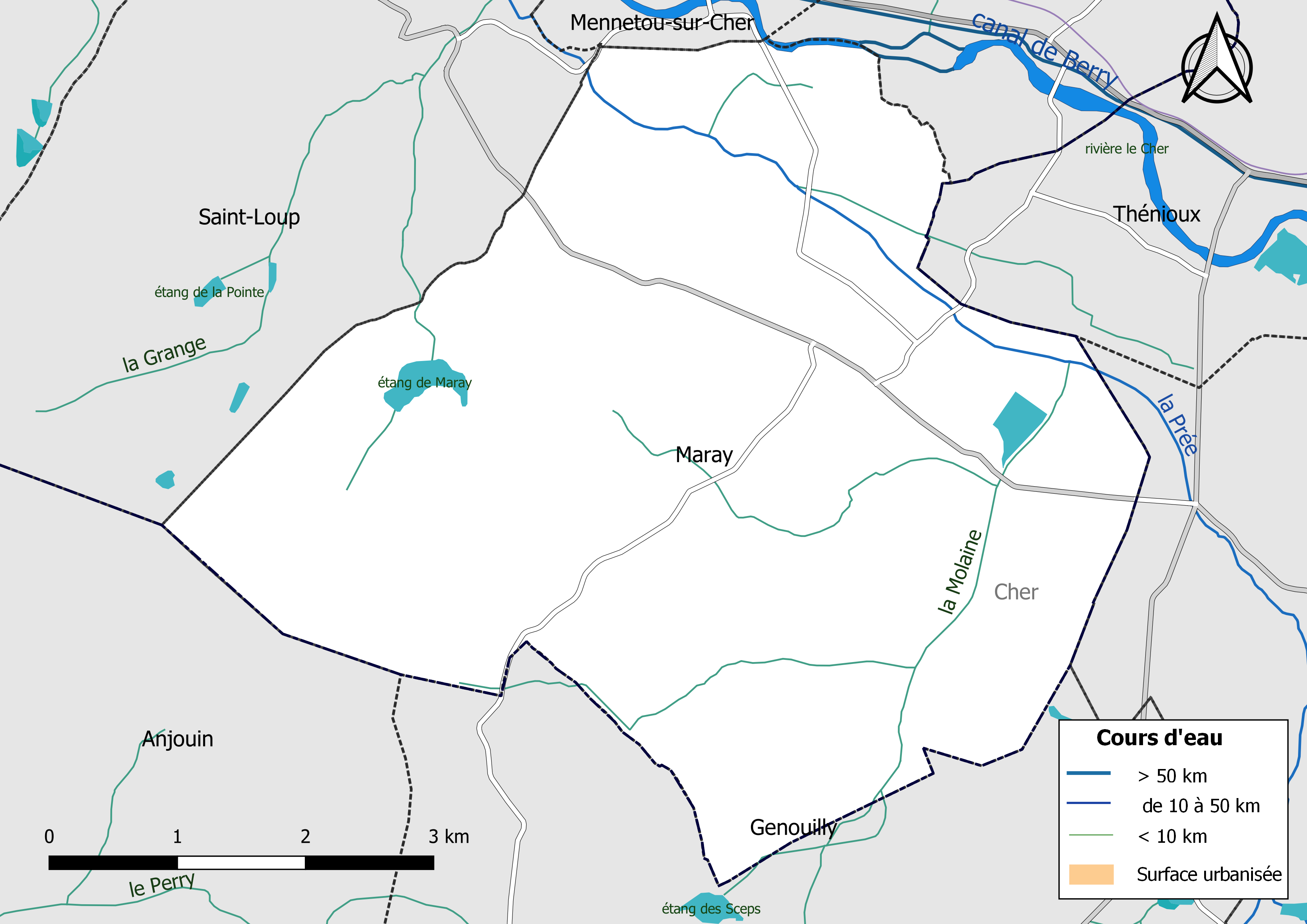 Carte du réseau hydrographique de la commune de Maray (Loir-et-Cher, France).